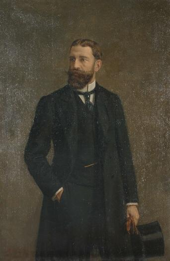 Retrato del aristócrata y político español Mariano Fernández de Henestrosa y Ortiz de Mioño (1858-1919), que fue alcalde de Madrid y ostentó los títulos de duque de Santo Mauro y conde de Estradas.